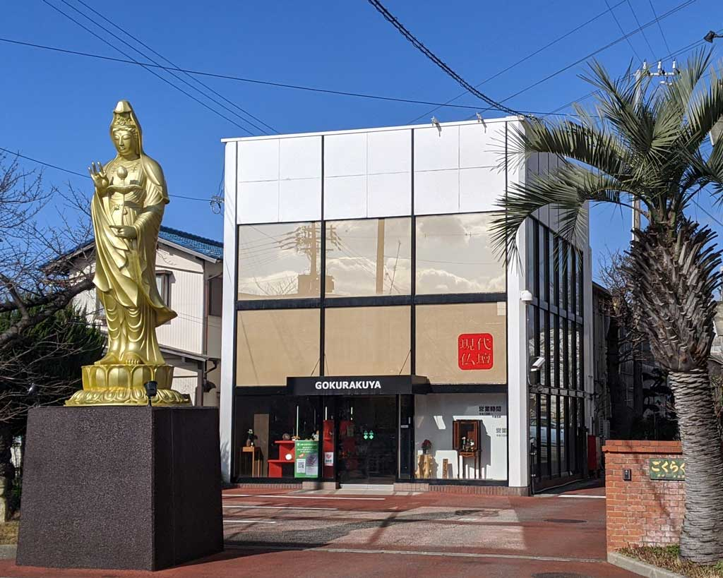 兵庫県加古川市にある仏壇仏具製造小売